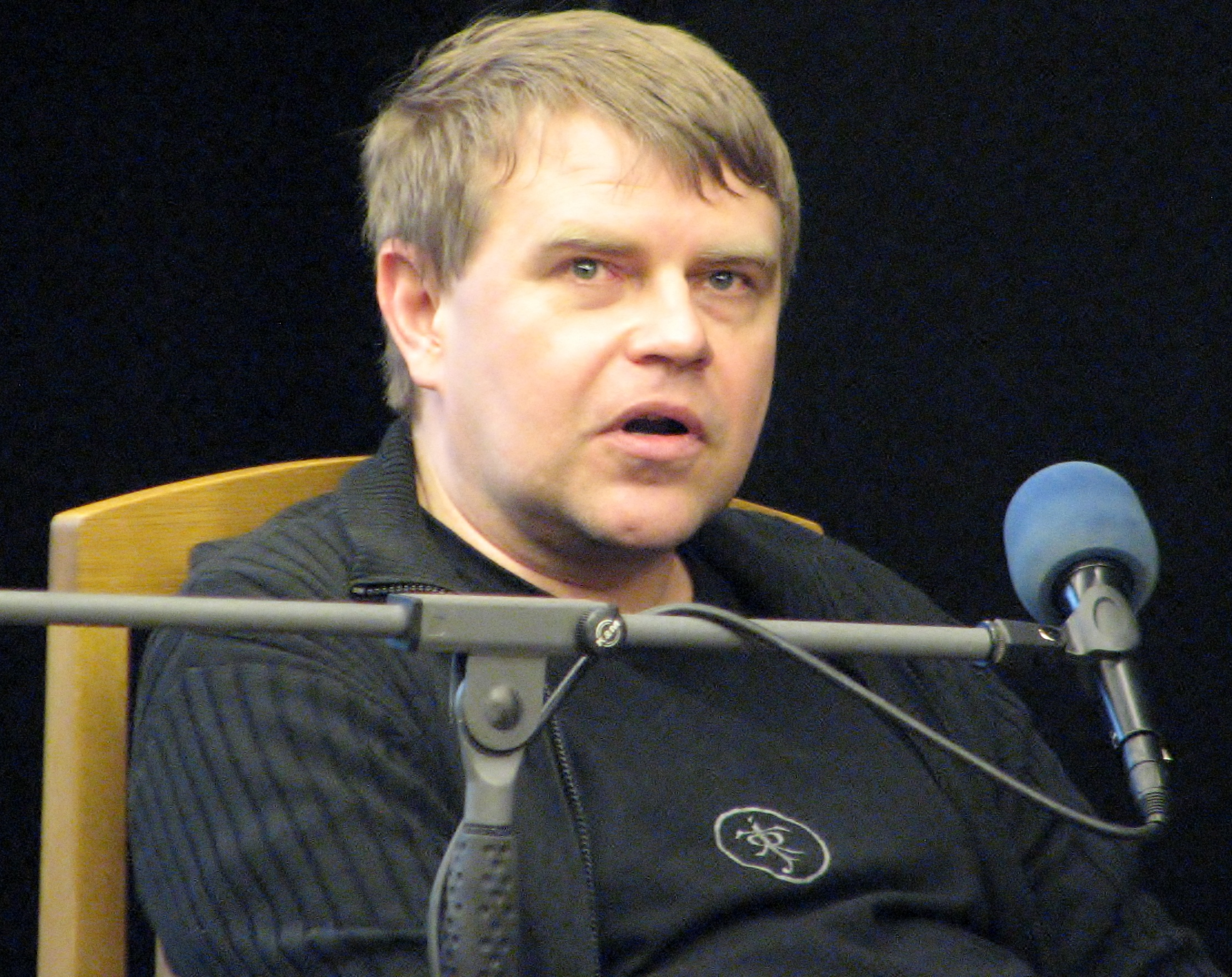 keel" Eesti Draamateatri maalisaalis